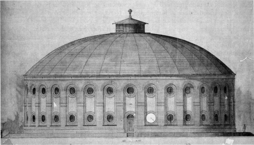 Arkitektens tegning af Østre Gasværk, København